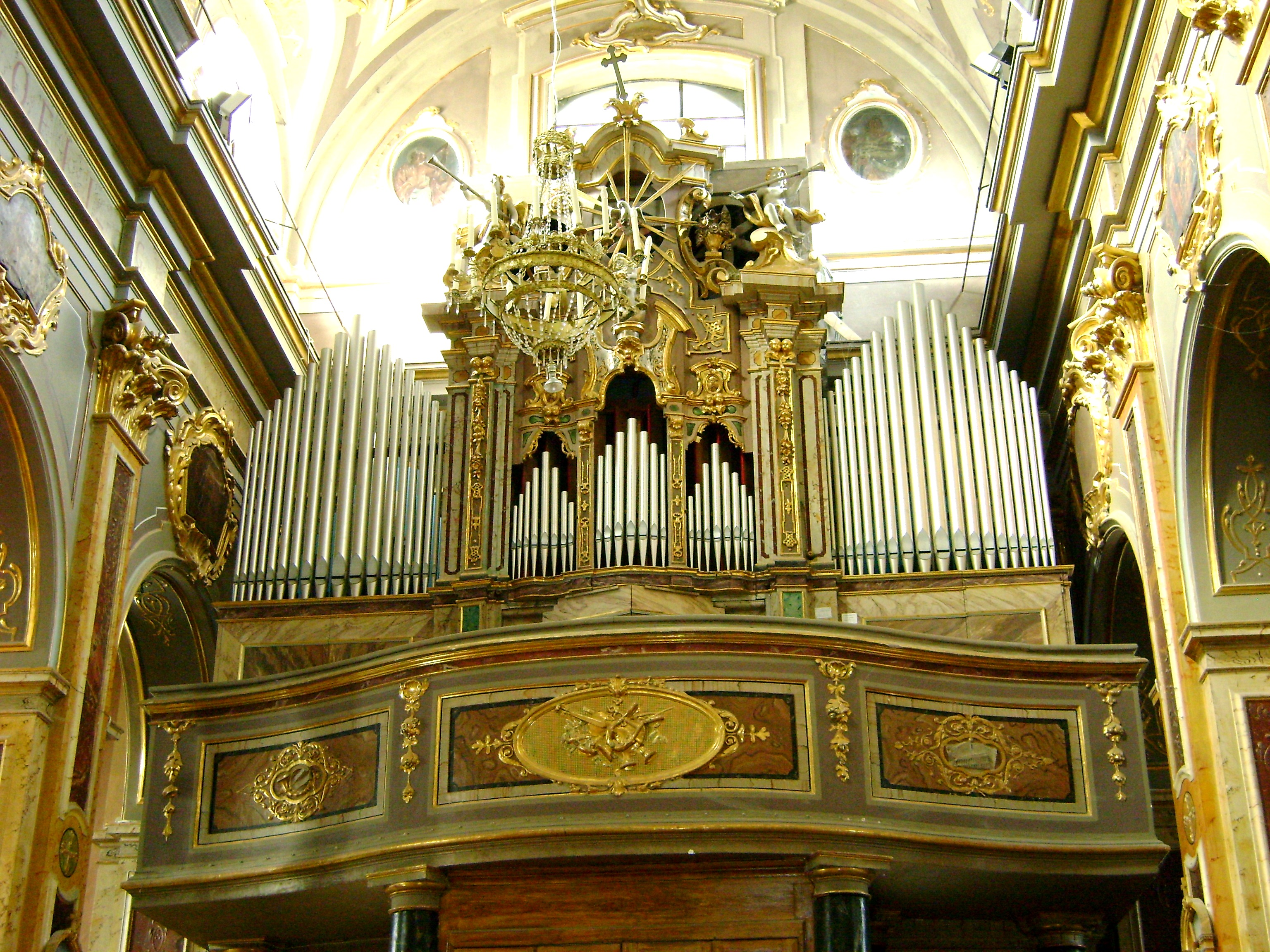 Organo della chiesa di San Leucio, Atessa, Chieti.